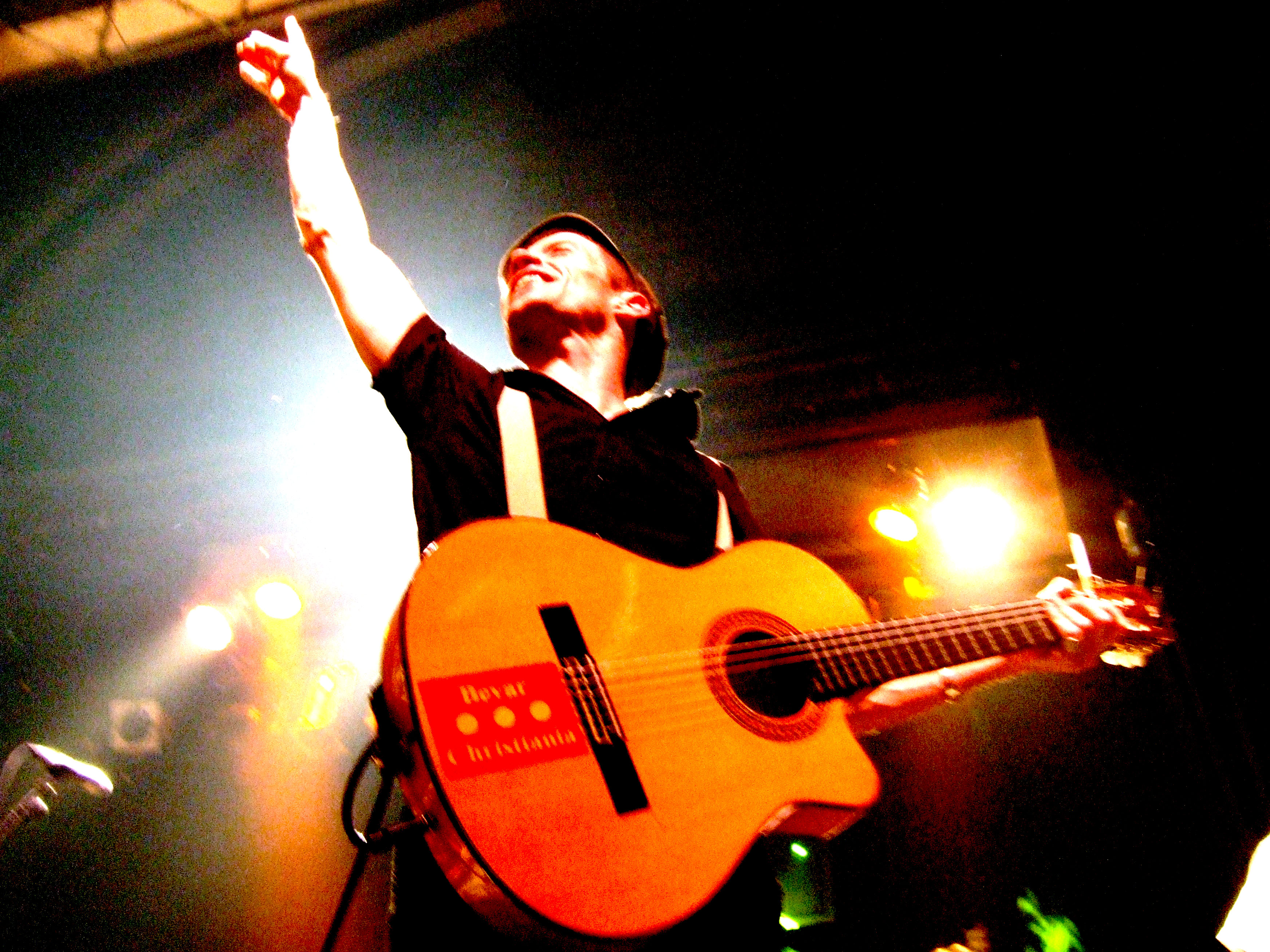 Foto del concierto en la sala Heineken de Madrid, proporcionada por Davinci.